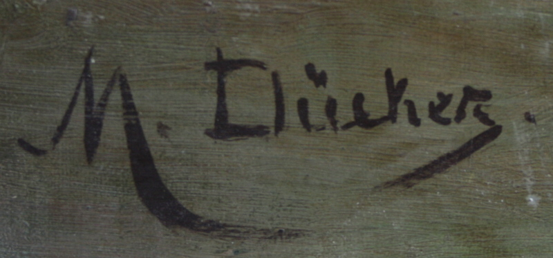 Signatur von Marie Dücker auf der Rückseite eines Gemäldes